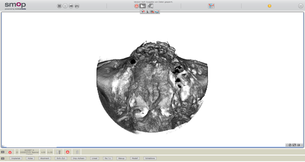 Planungstool für navigierte Implantologie: DVT abgebildet